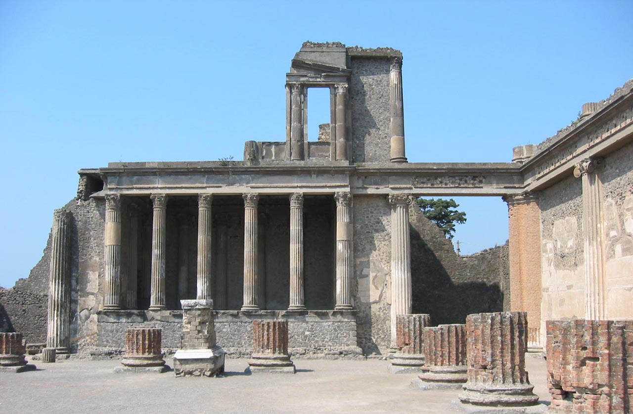 Pompeii, Basilica.